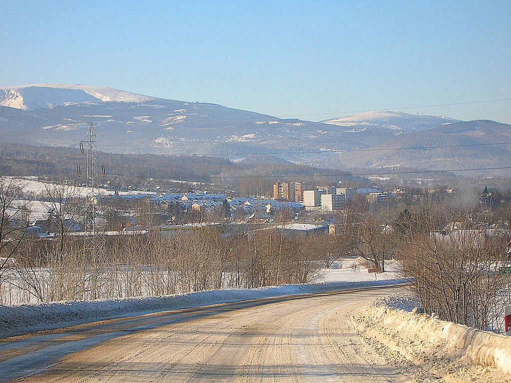 Kowary - Widok z trasy z Wałbrzycha.